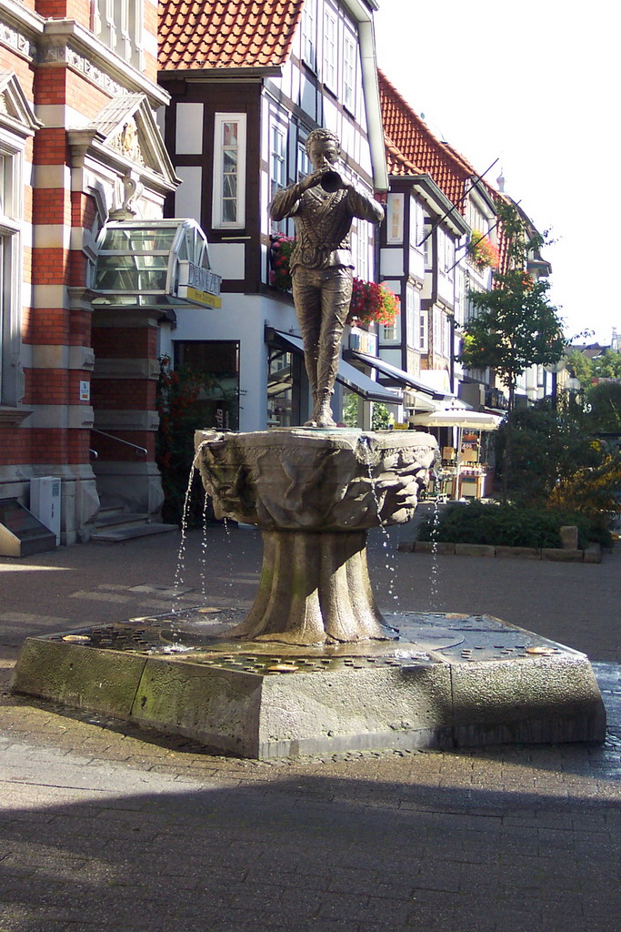 Der Rattenfängerbrunnen in Hameln, Deutschland.